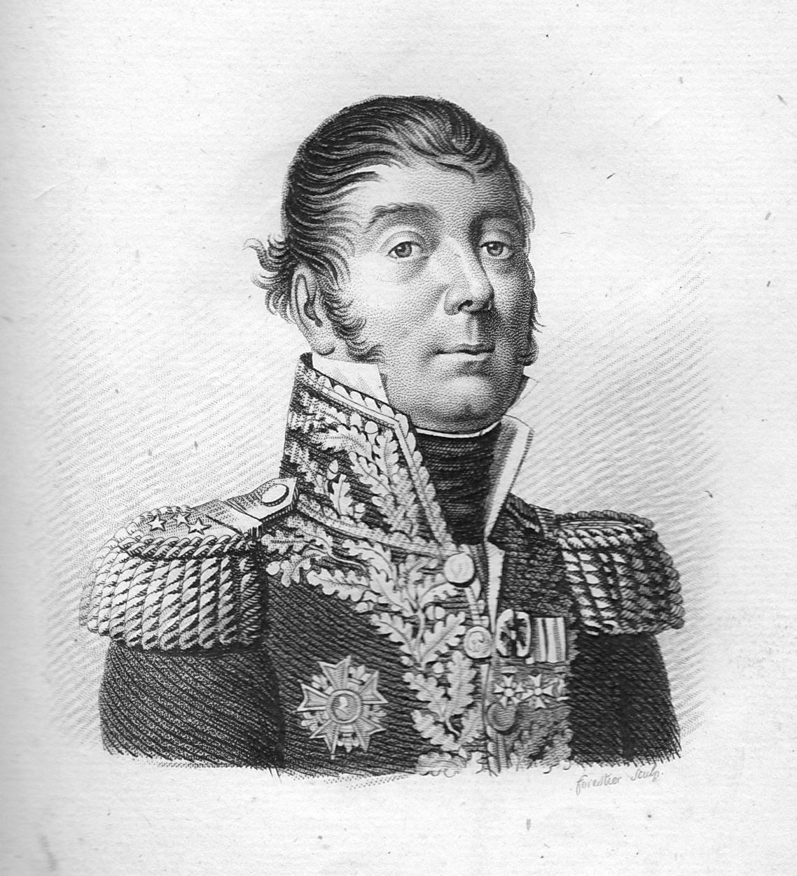 Le général Antoine-Guillaume Rampon (1759-1842). Il s'illustra à Montenotte à la tête de la 32e demi-brigade.